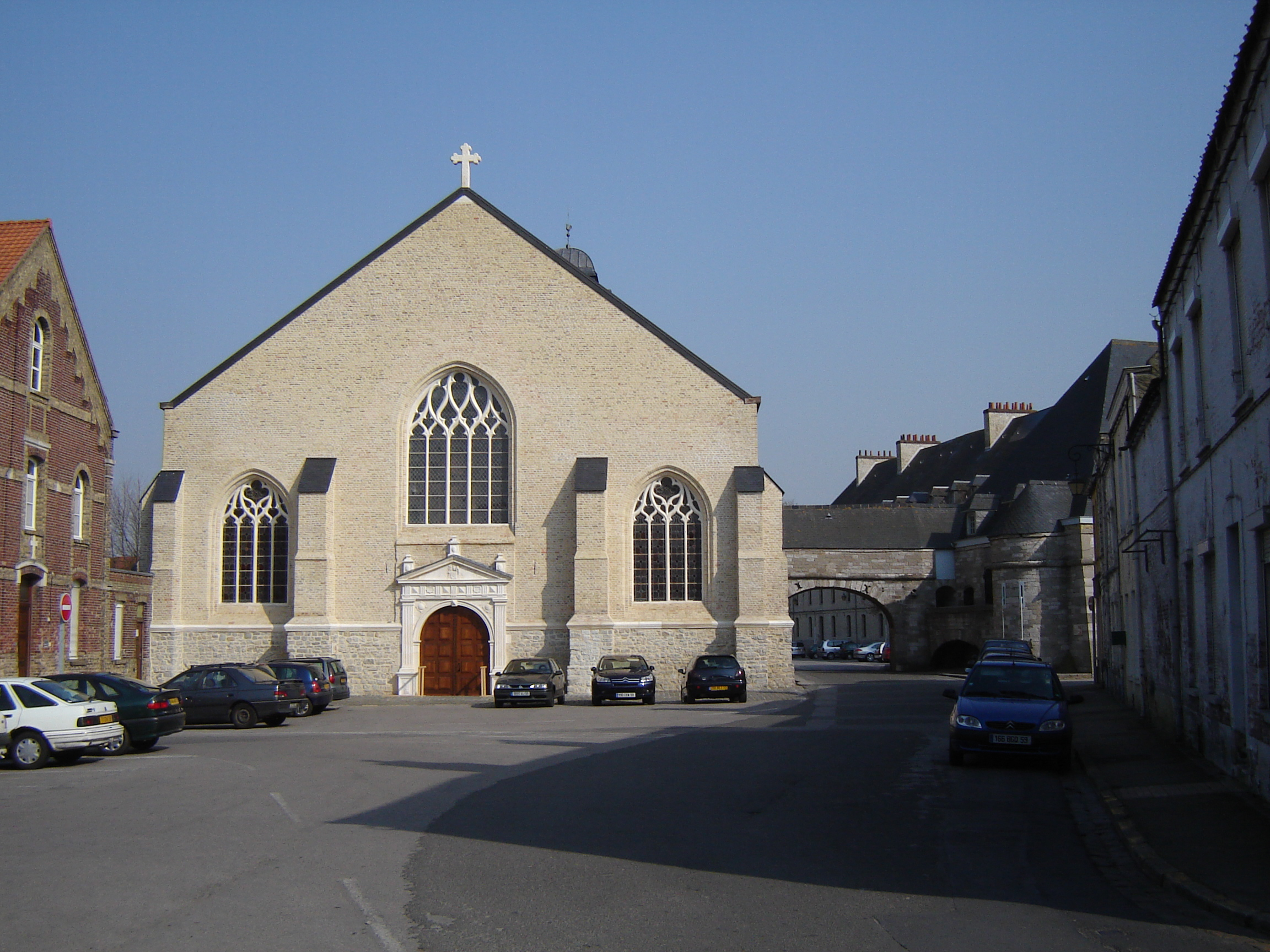 Eglise Saint-Willibrord in Gravelines, Nord, Nord-Pas-de-Calais, France